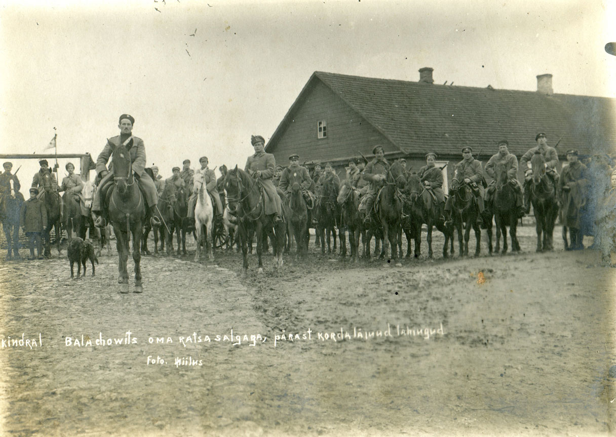 Беларуская (тарашкевіца): Конны атрад Станіслава Булак-Балаховіча (побач сабака Райт), кастрычнік-лістапад 1919